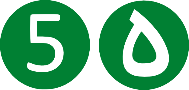 علامت خط 5 مترو تهران